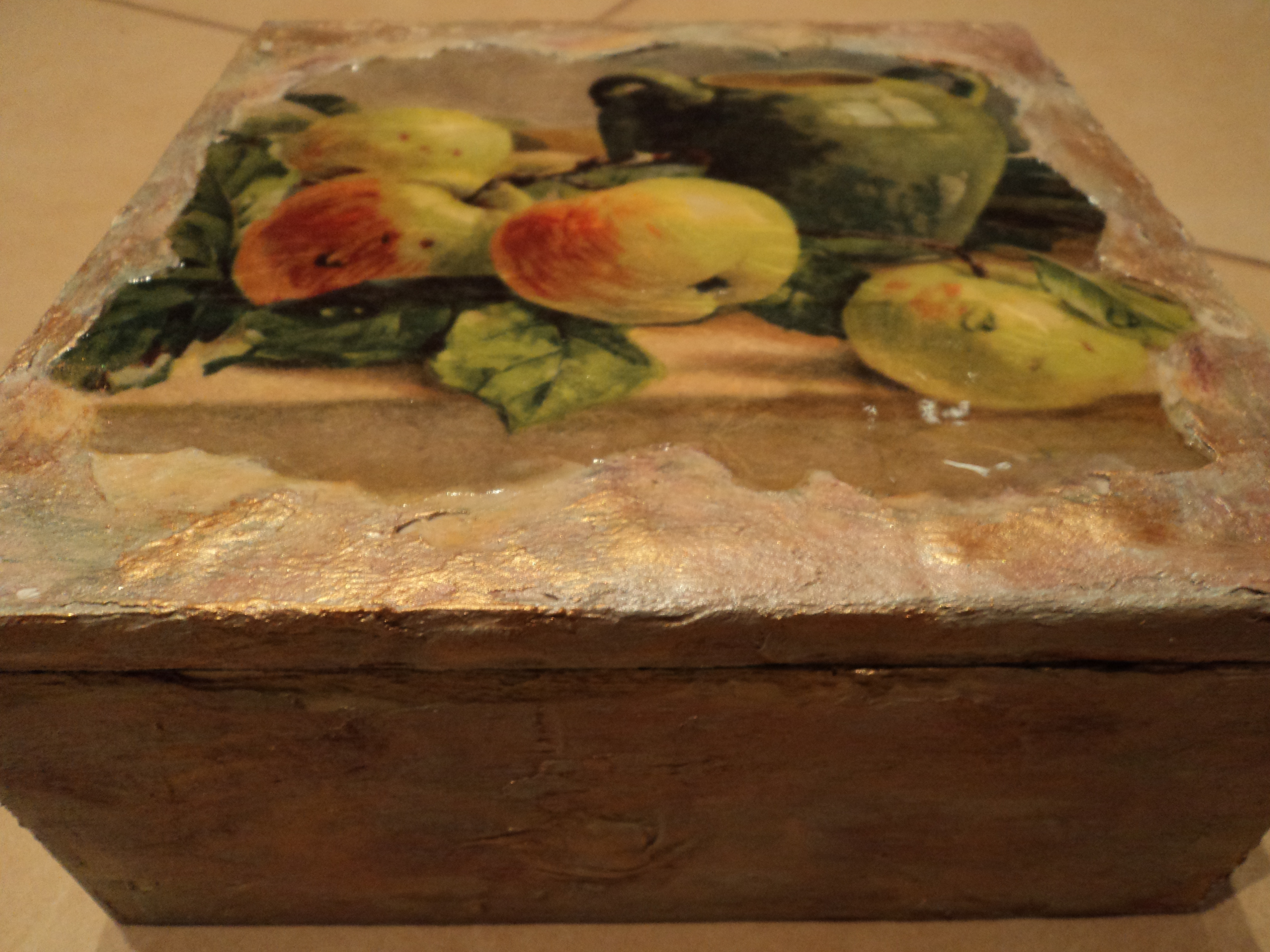 Kaszëbsczi: Kasta òzdobiónô decoupage